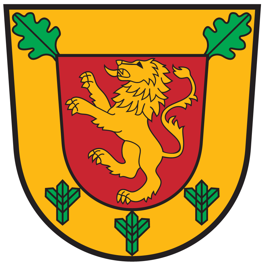 Wappen von Glaenegg